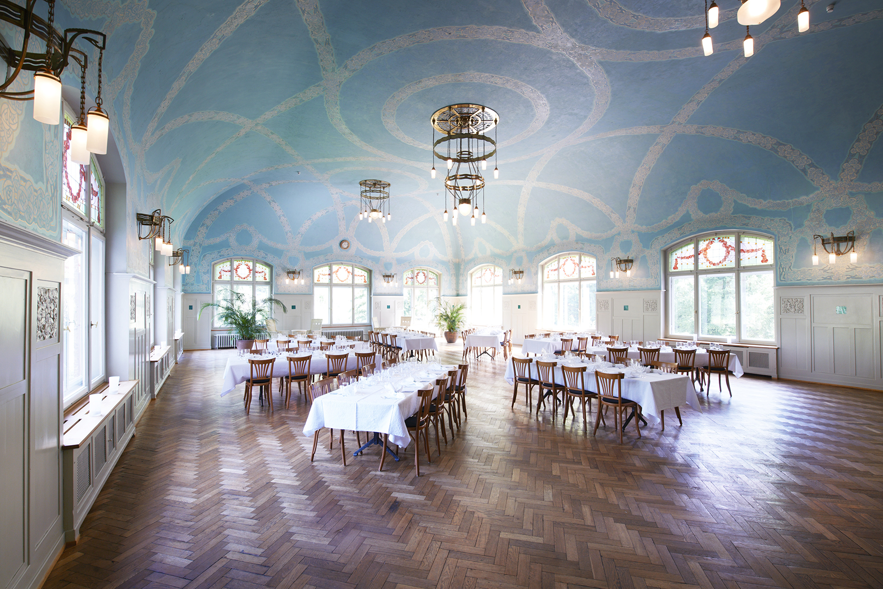 Jugendstilsaal